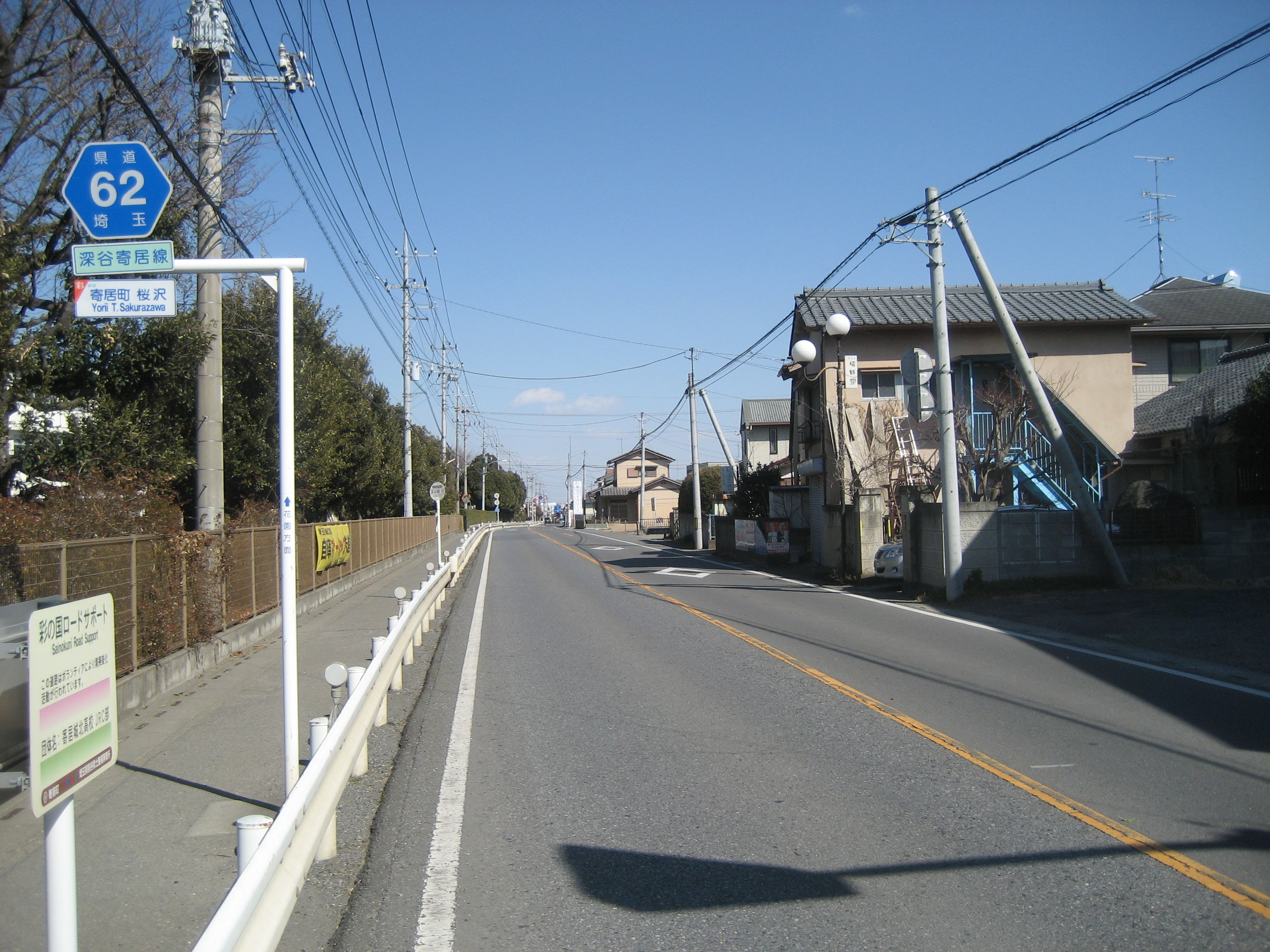 埼玉県道62号線寄居町桜沢付近